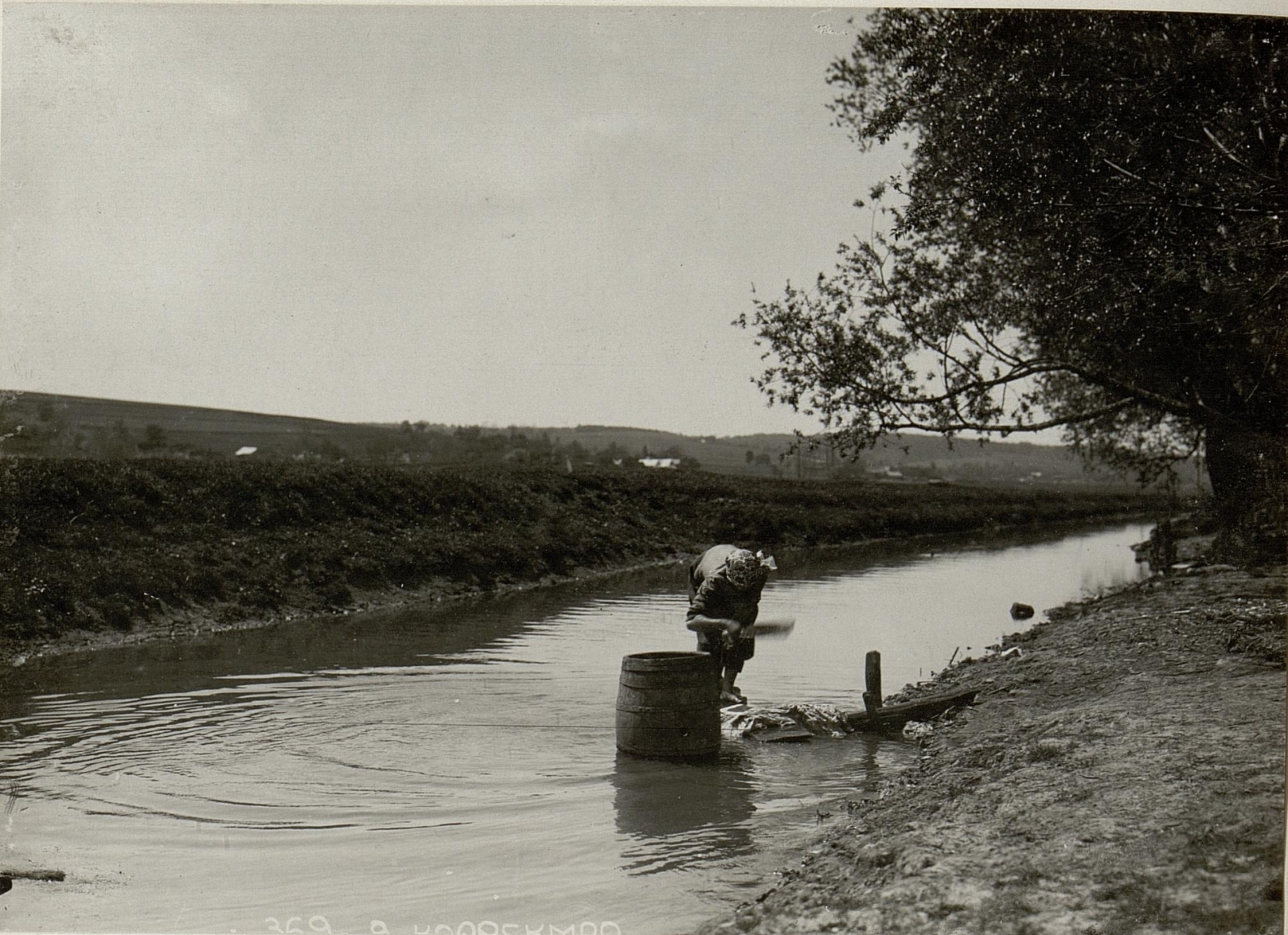 An der Zlota Lipa